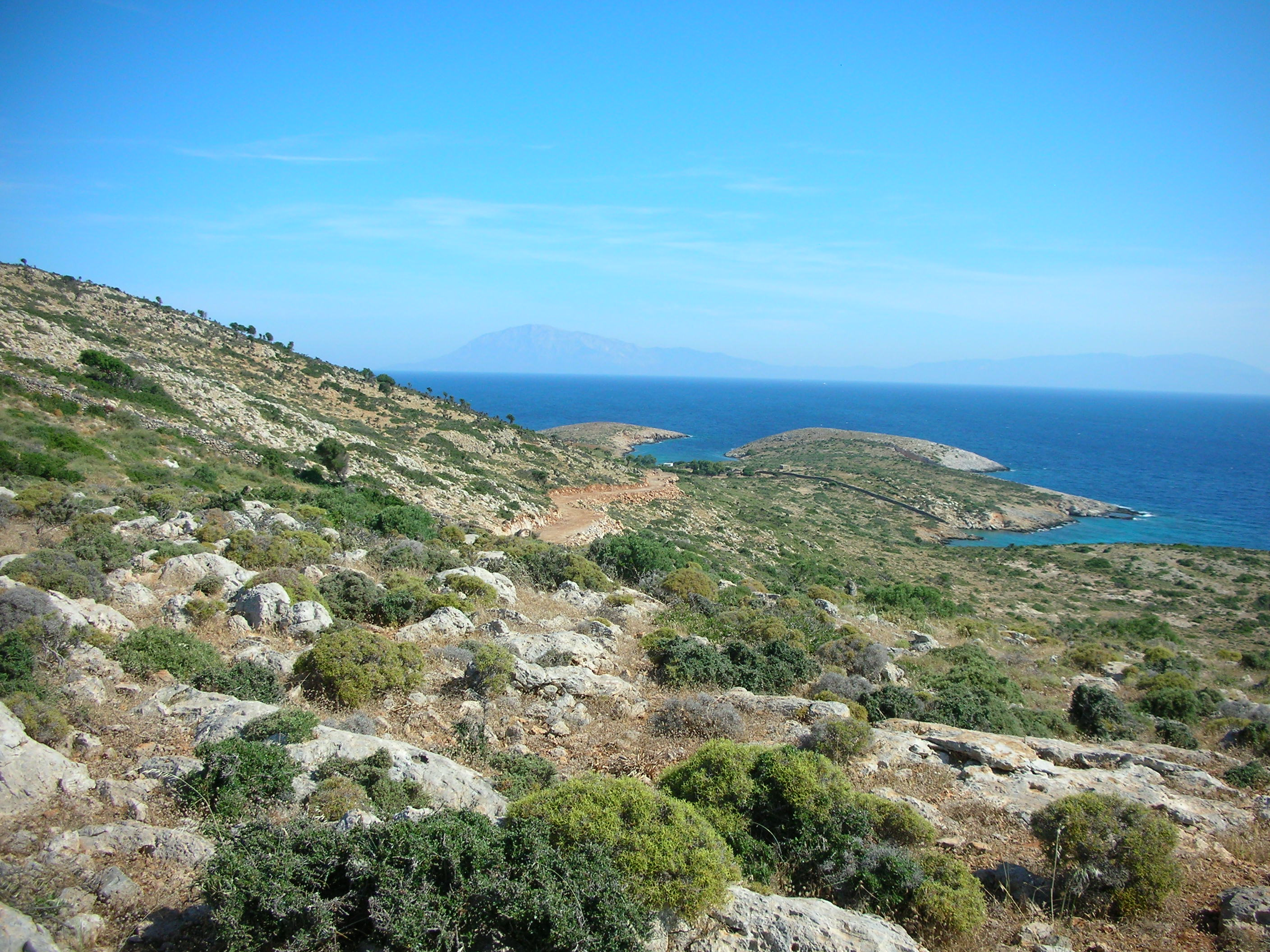 Landschaft im Nordosten von Arki